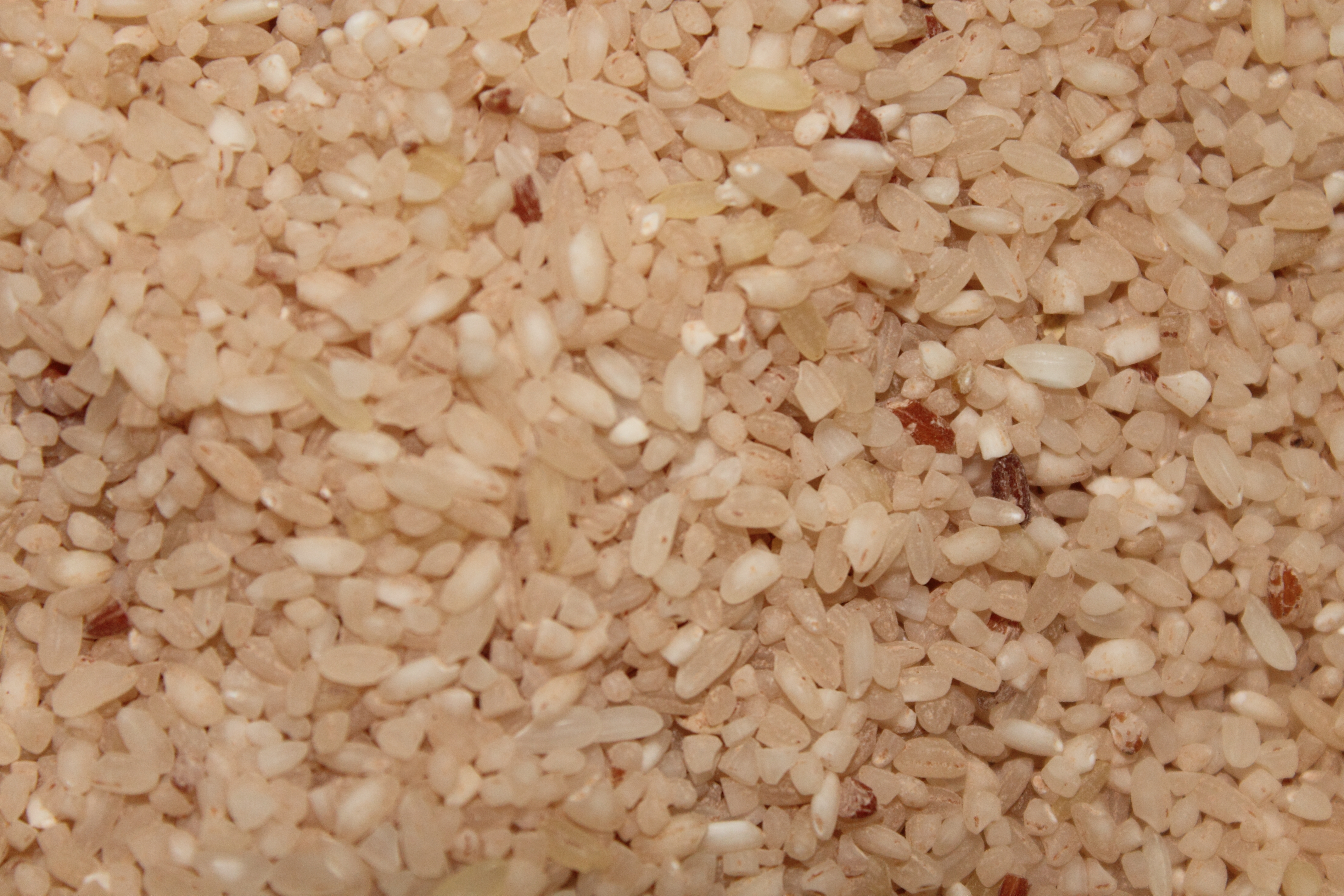 കേരളത്തിലേ തനതു അരികൾ